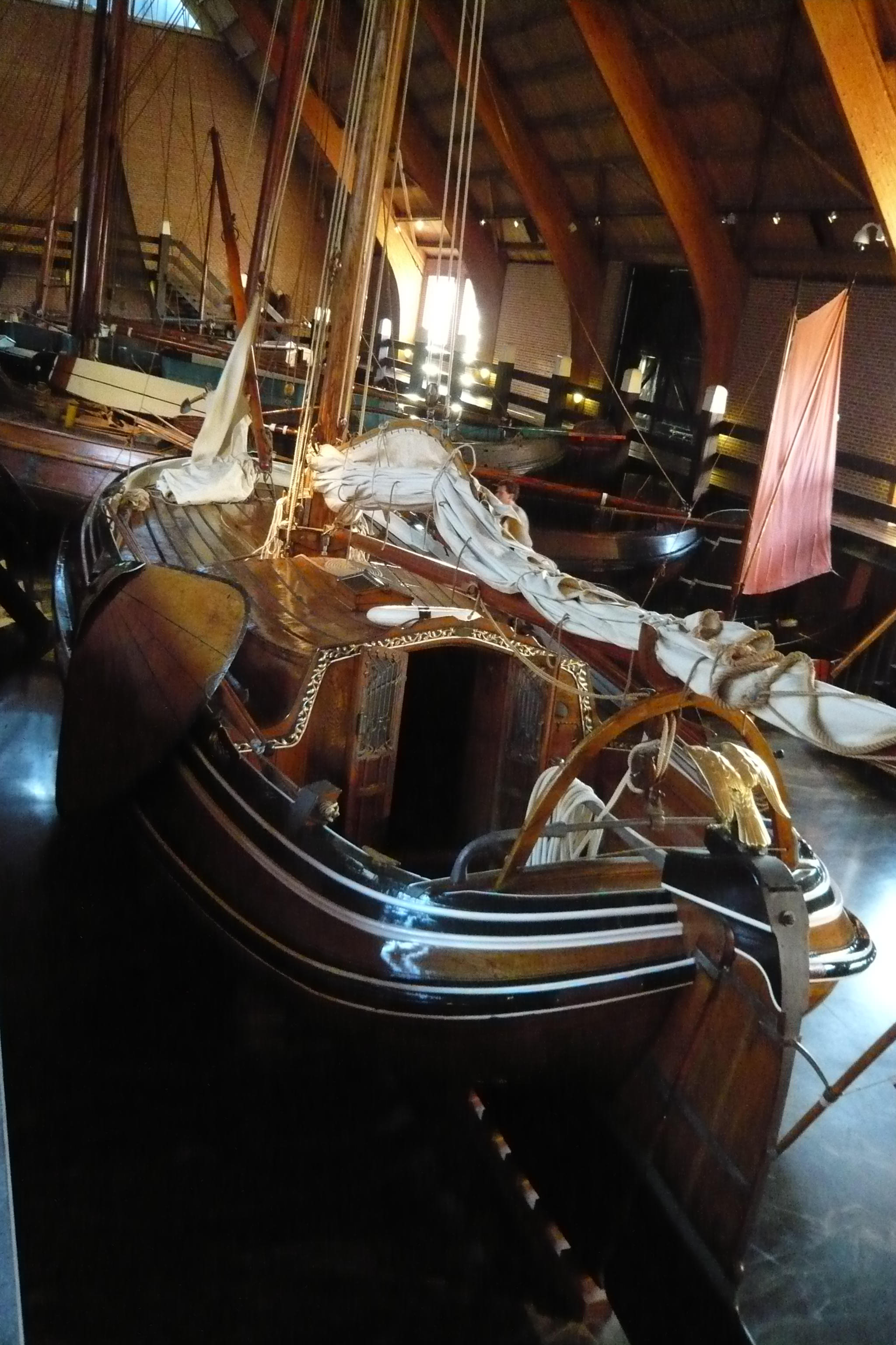 Zuiderzee museum, Enkhuizen. Schepenhal met boeier de 'Sperwer' waarmee de vroegere eigenaar Merlin Minshall naar de Zwarte Zee reisde over de Donau.